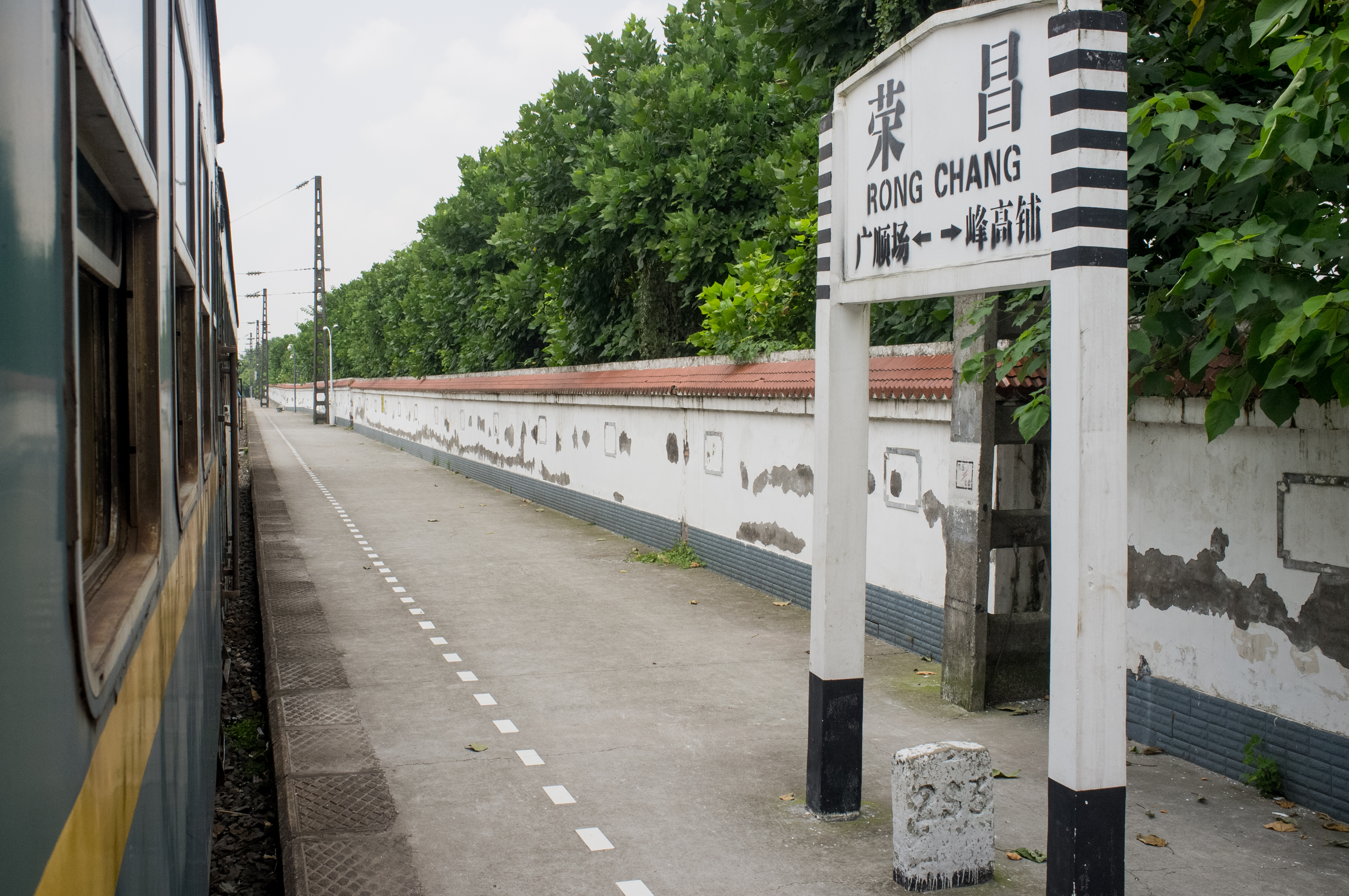 中文（中国大陆）: 成渝铁路荣昌站